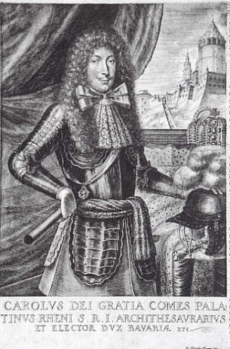 Karl II. von der Pfalz (1651–1685)